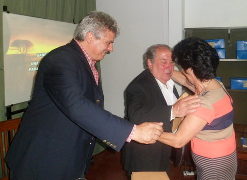 César Arrondo, en 2014, en la presentación de un libro en Chascomús (Argentina).